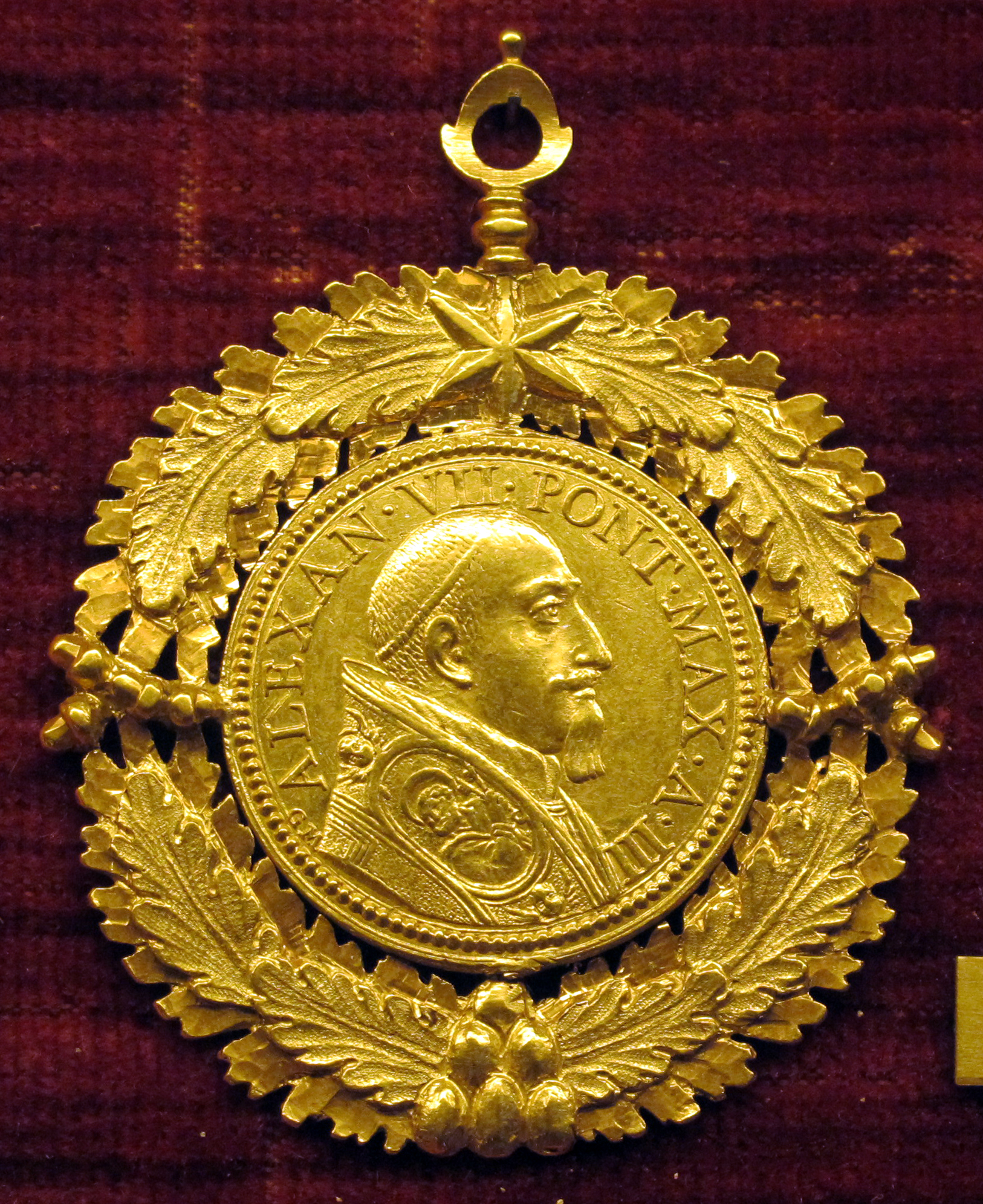 Medaglie romane '600-'700